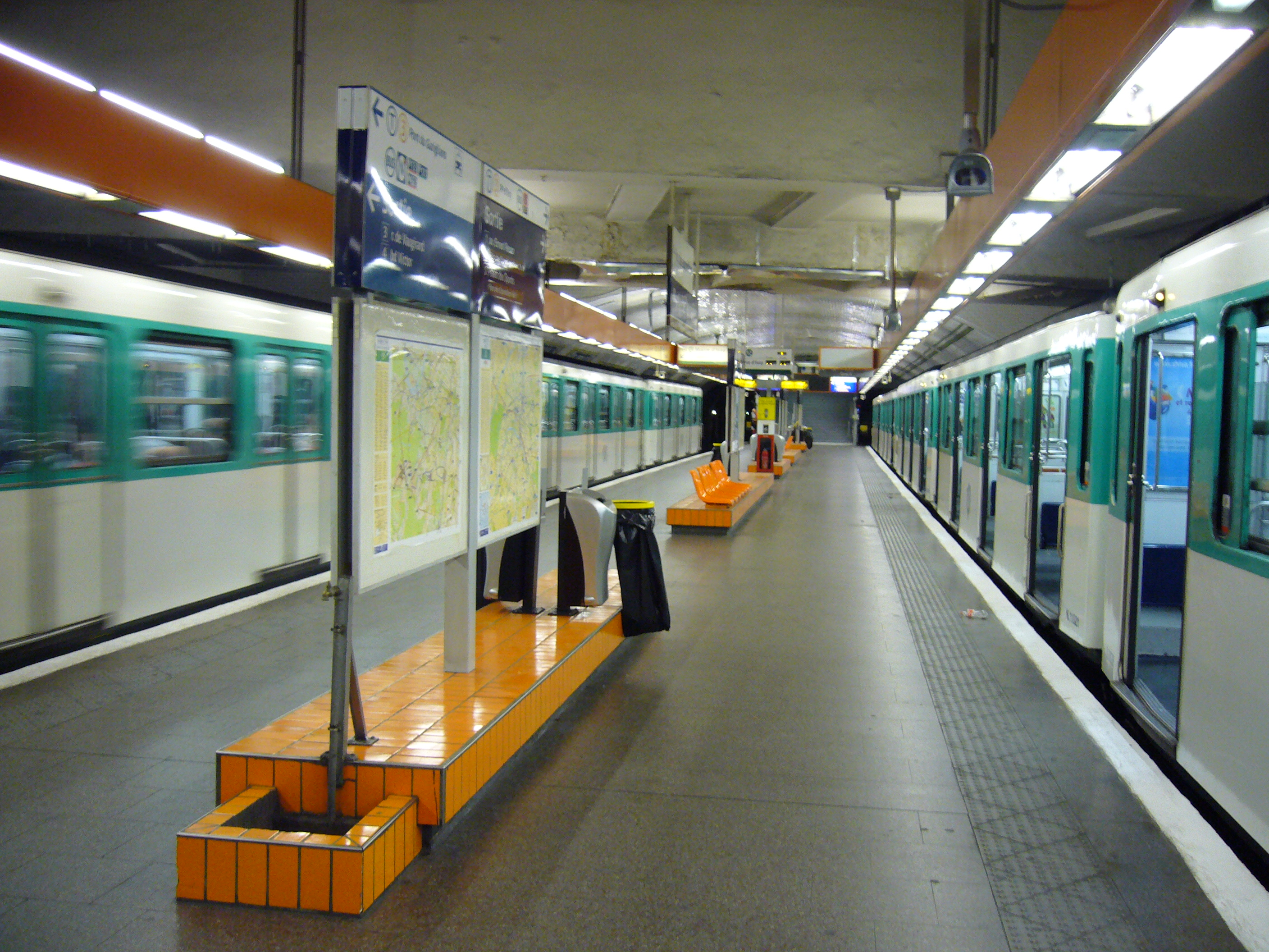 Station Porte de Versailles sur la ligne 12 du métro de Paris.